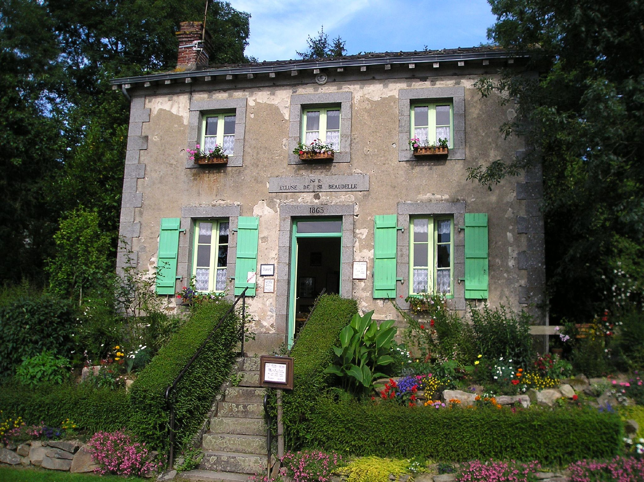 Maison éclusière de Saint-Baudelle, Mayenne, France.